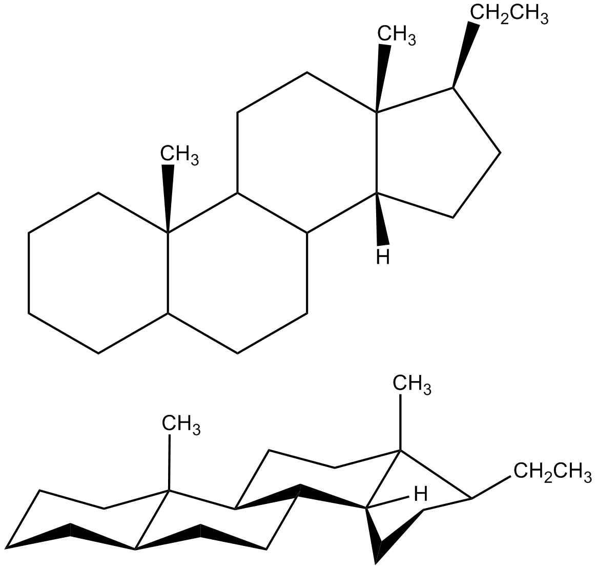 isómero 14b del pregnano